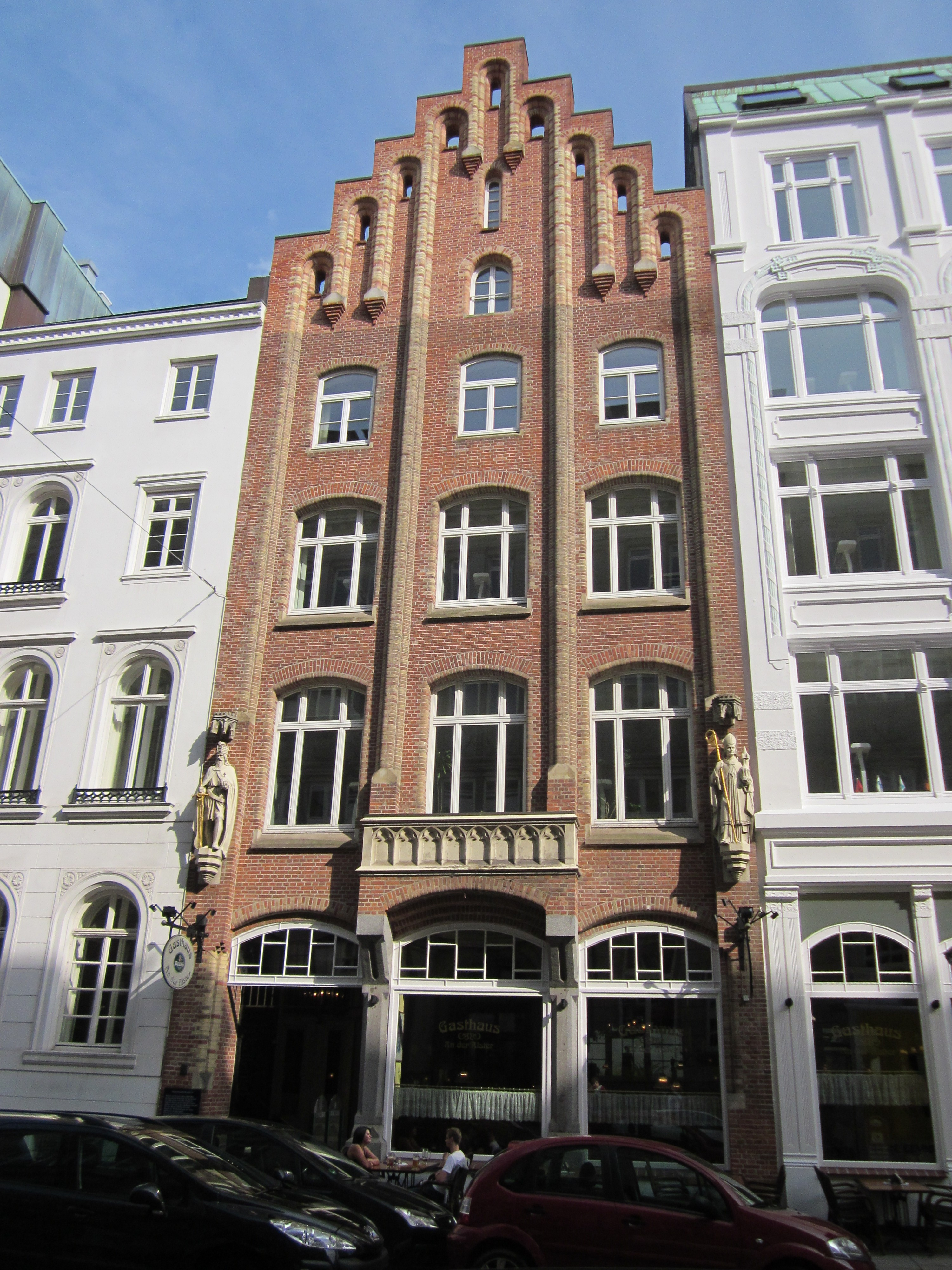 Das Haus Ferdinandstraße 65 in Hamburg-Altstadt wurde 1843/44 von Theodor Bühlau für den Rechtsanwalt Johann Friedrich Voigt im Stil der norddeutschen Backsteingotik erbaut. Seitlich des Eingangs befinden sich Statuen des Heiligen Ansgar und Karls des Großen. This is a photograph of an architectural monument.